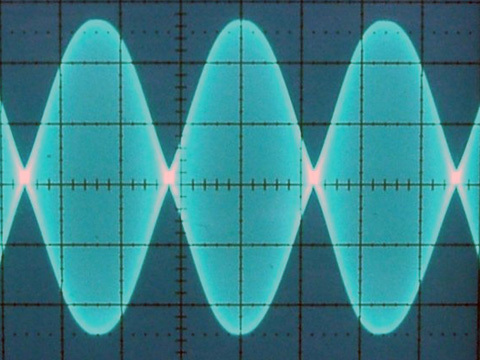 Zweiton-Linearitätstest